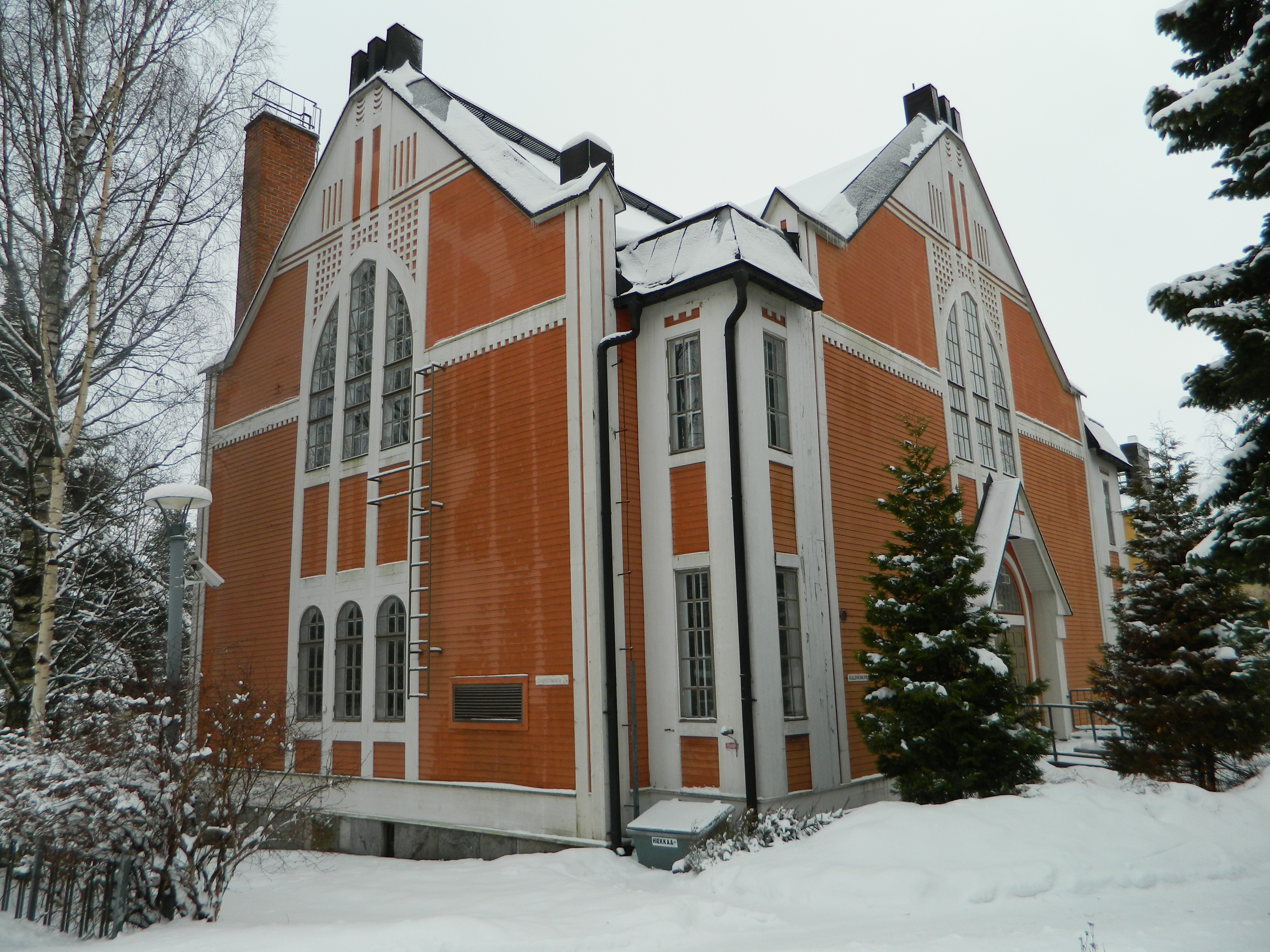 ulkokuva